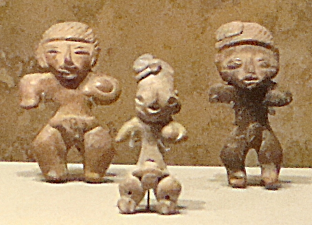 Figurillas de cerámica de Ticomán (México). Representan a jugadores de pelota. Período Preclásico Medio mesoamericano (ss. XV-IV a. C.). Se encuentran en exhibición en la sala Preclásico en el Altiplano del Museo Nacional de Antropología.